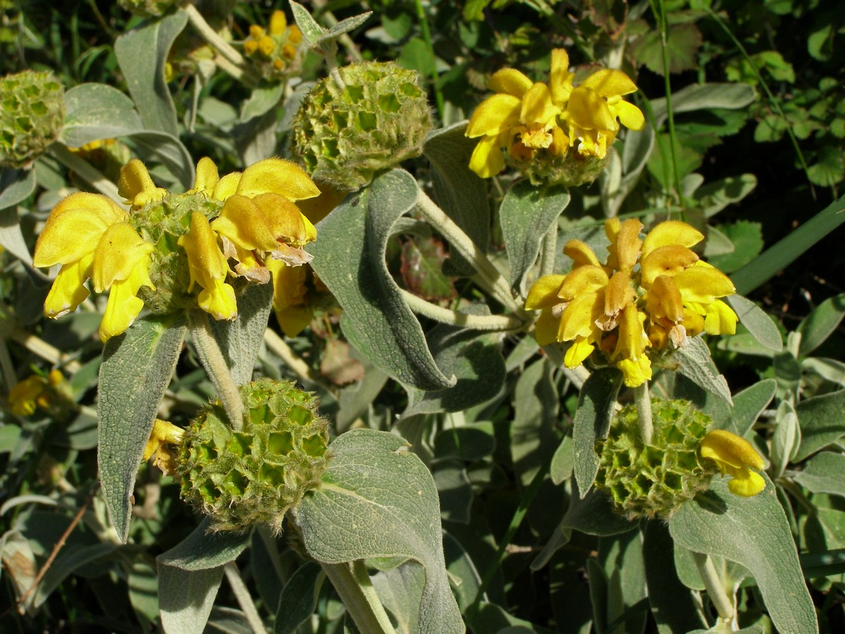 Brandkraut, Phlomis fruticosa auch "Jerusalem Salbei" auf Kreta, mit blühenden und ausgeblühten Blütenständen.